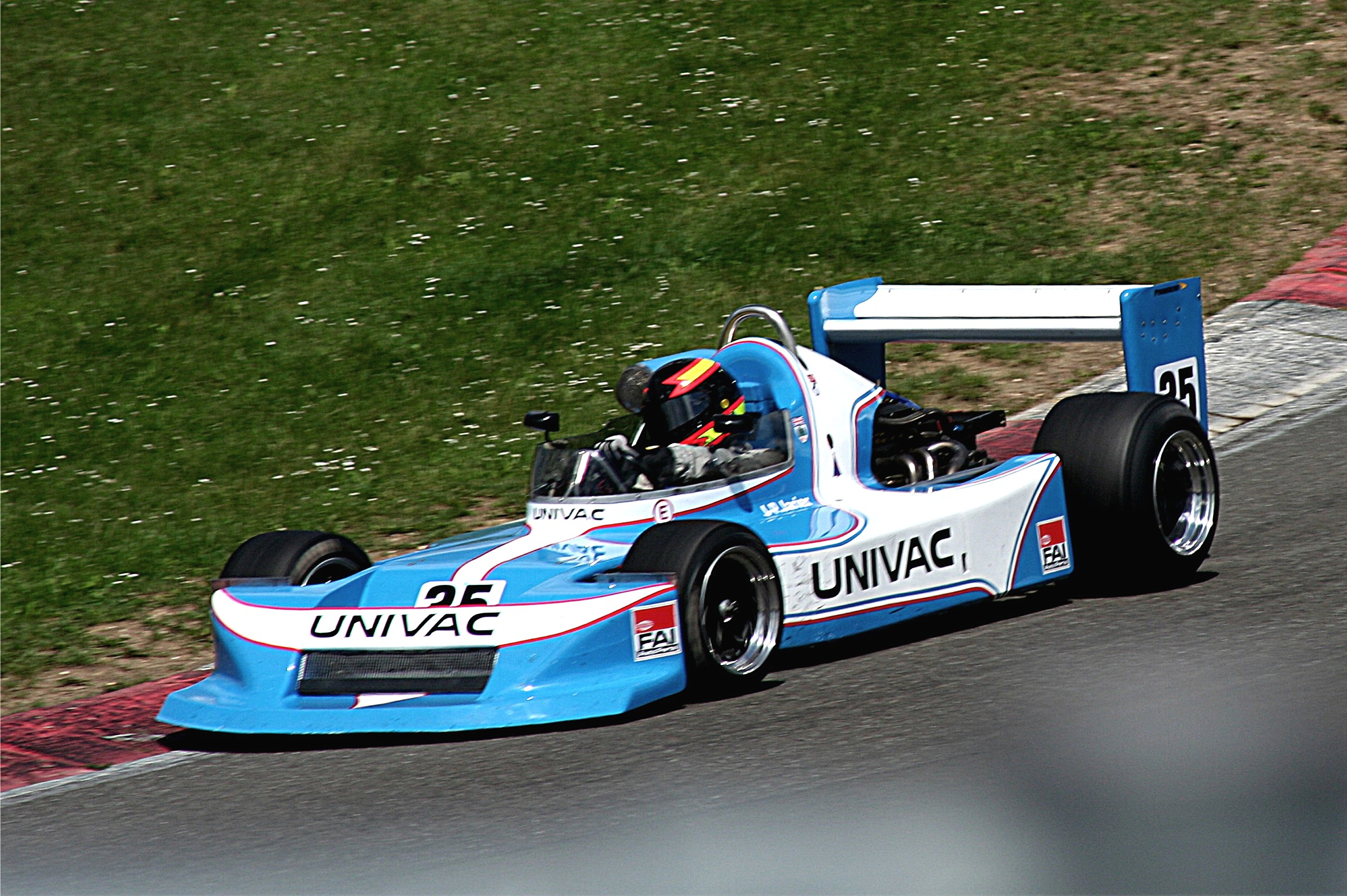 March 782, Formel-2-Wagen von 1978, ehemals Jean-Pierre Jarier